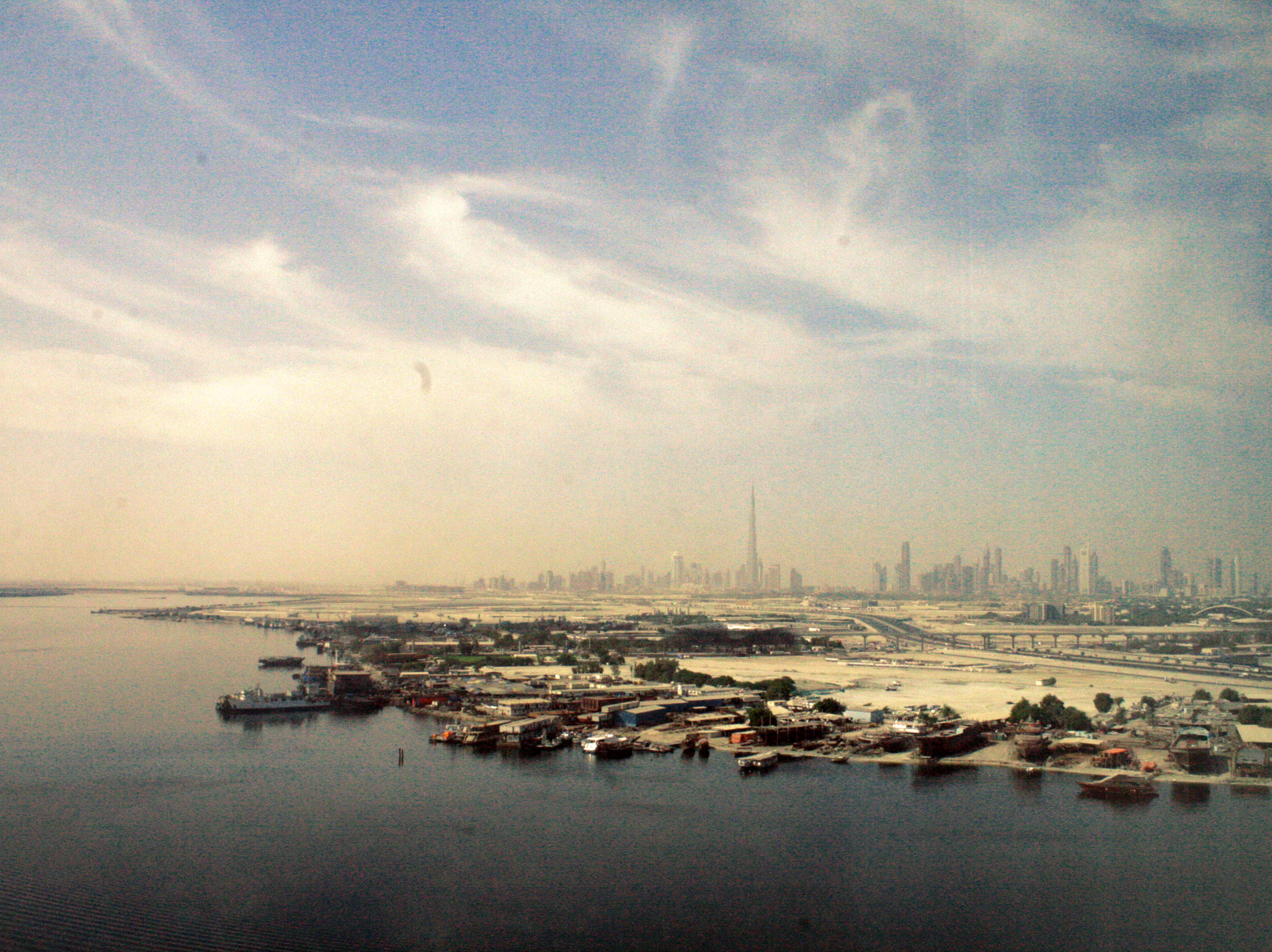 here you go 3shge Blade :'D xoxoxxx.